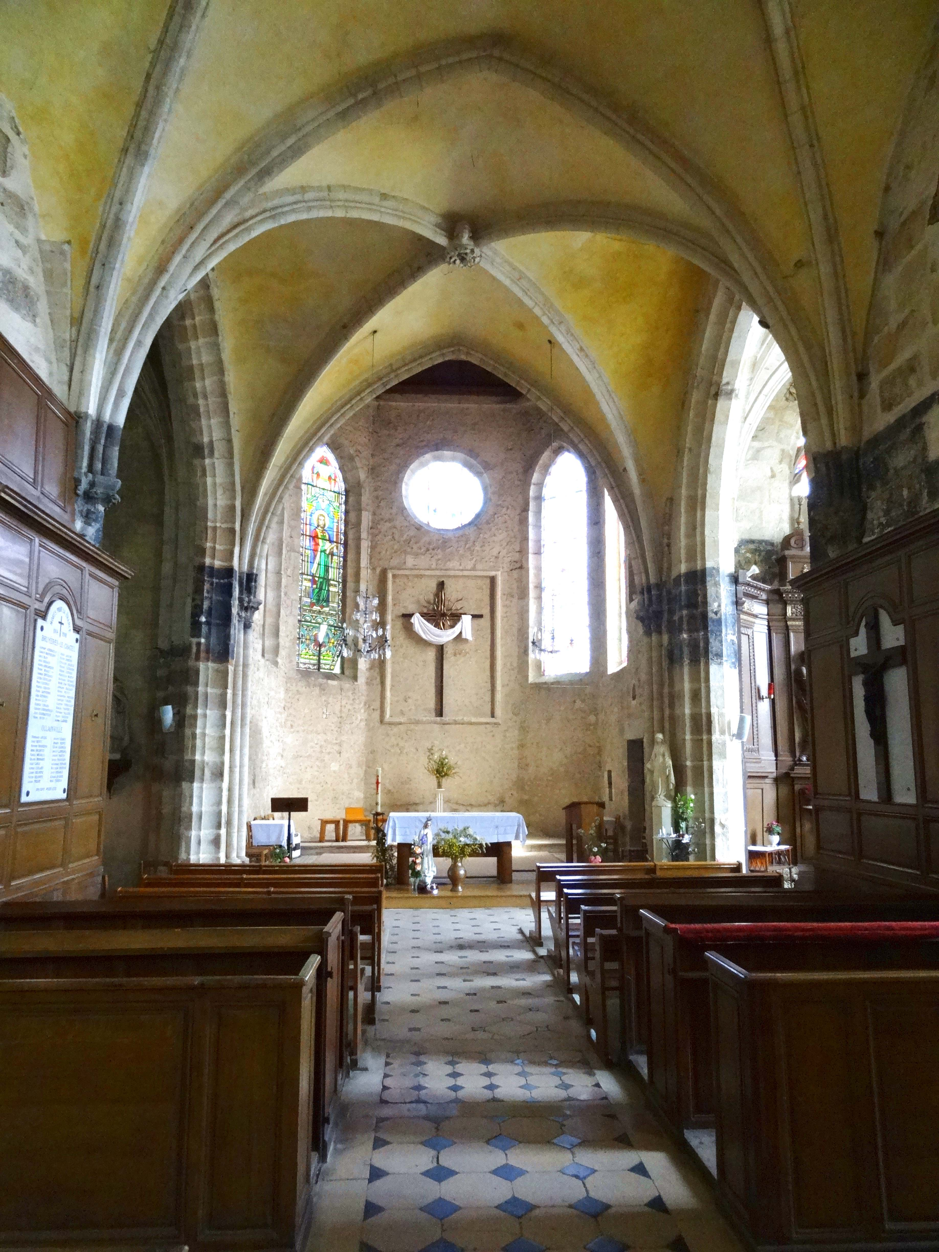 Intérieur de l'église - voir titre.